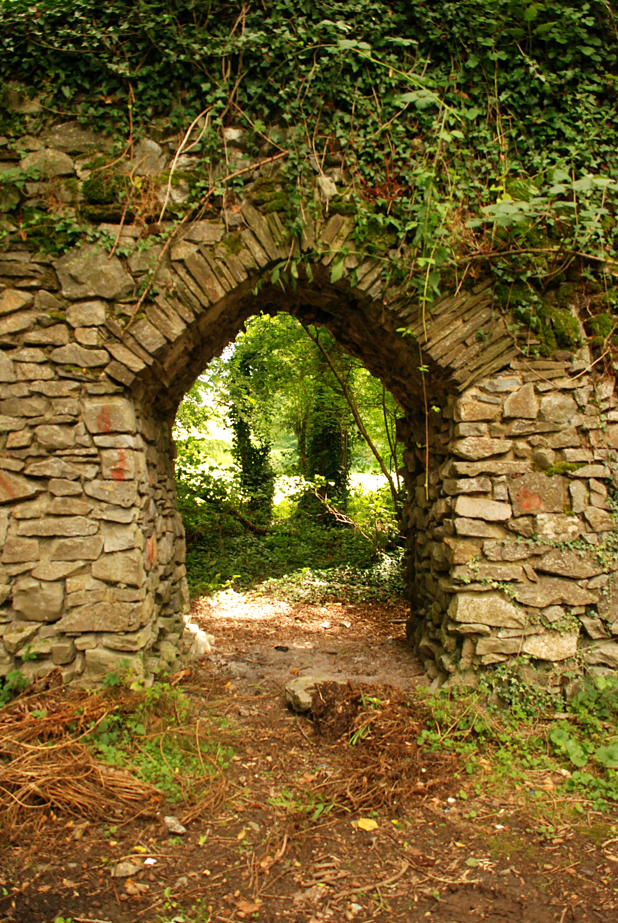 Aqueduc romain de Mettet